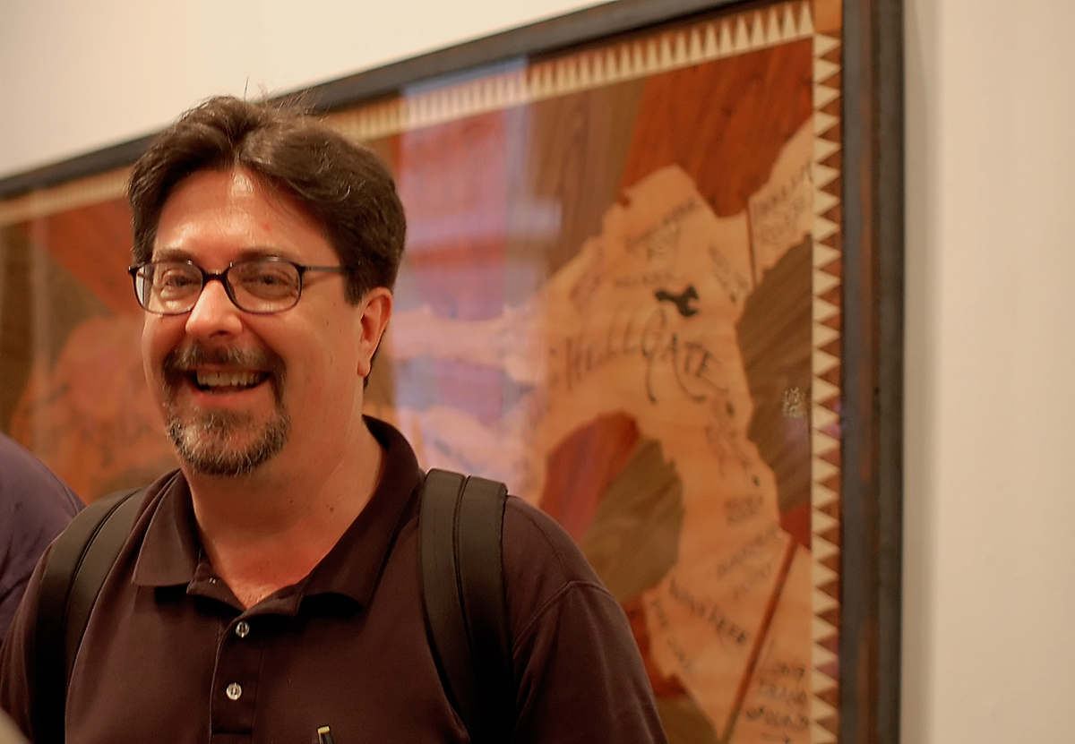 Patrick Nielsen Hayden, 2008